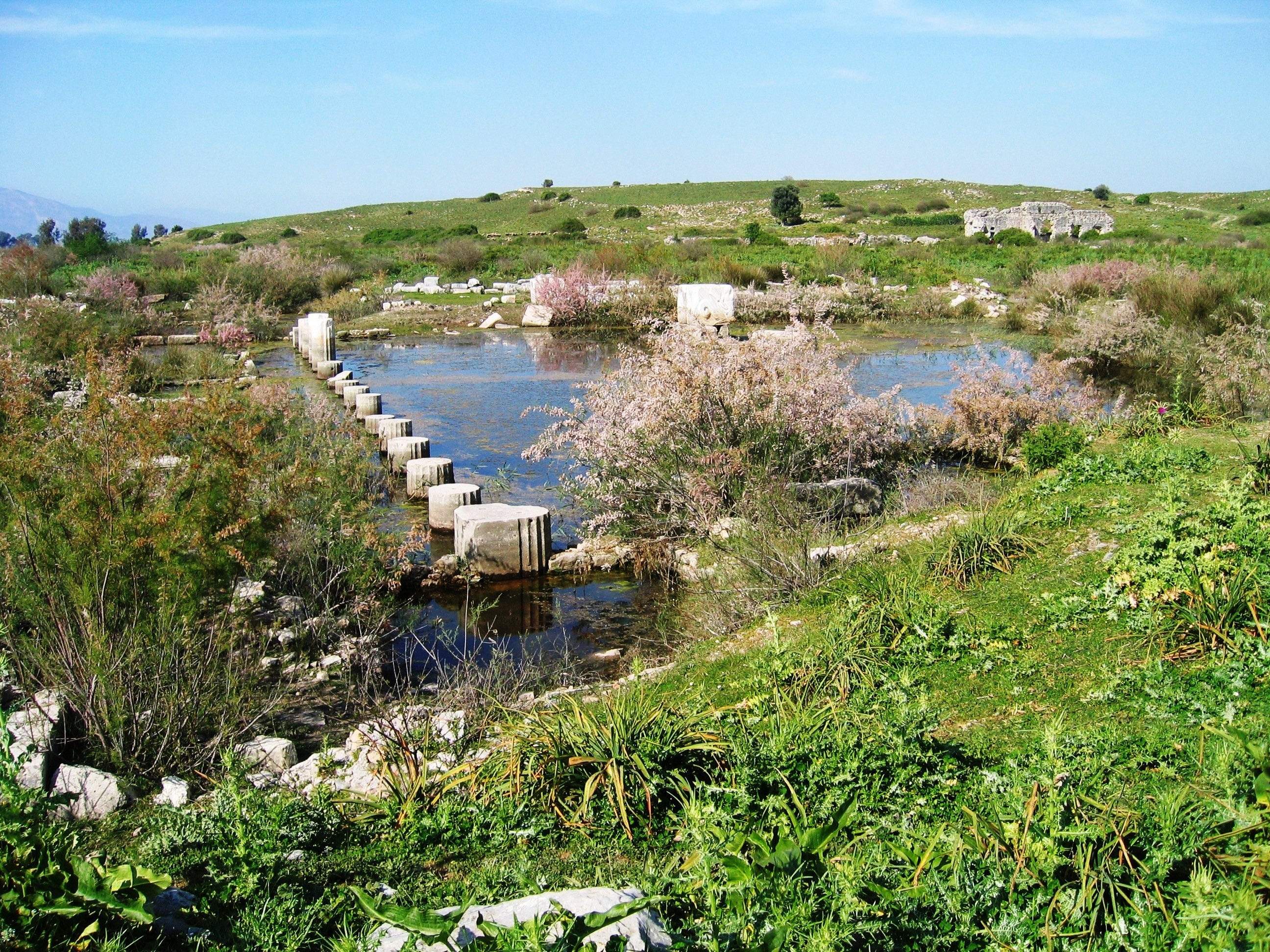 Turquie Milet Ville Port Des Lions 25042011